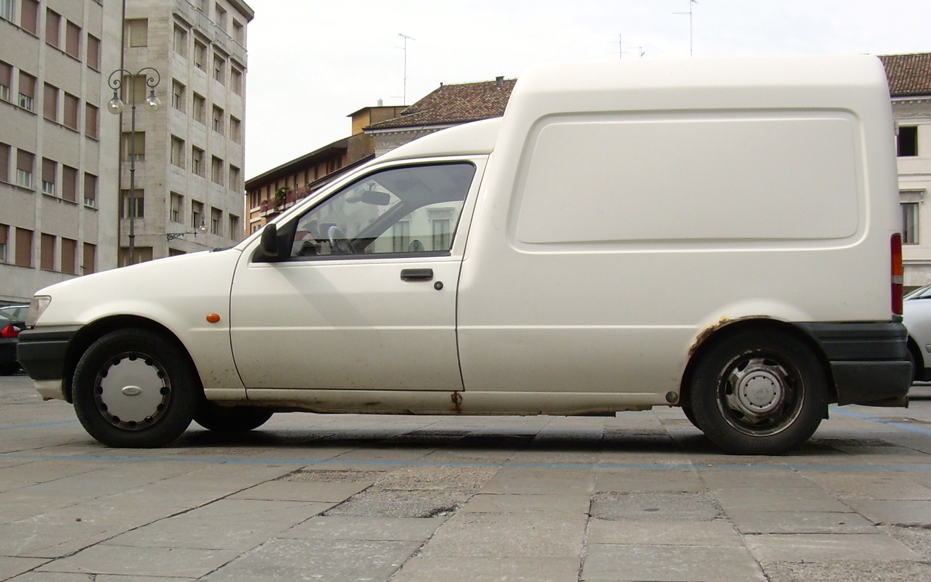 Autore:Powering Data:17/12/06 Foto personale di un Ford Courier Licenza